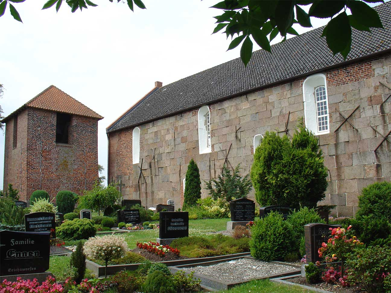 Mariakerk van Buttforde